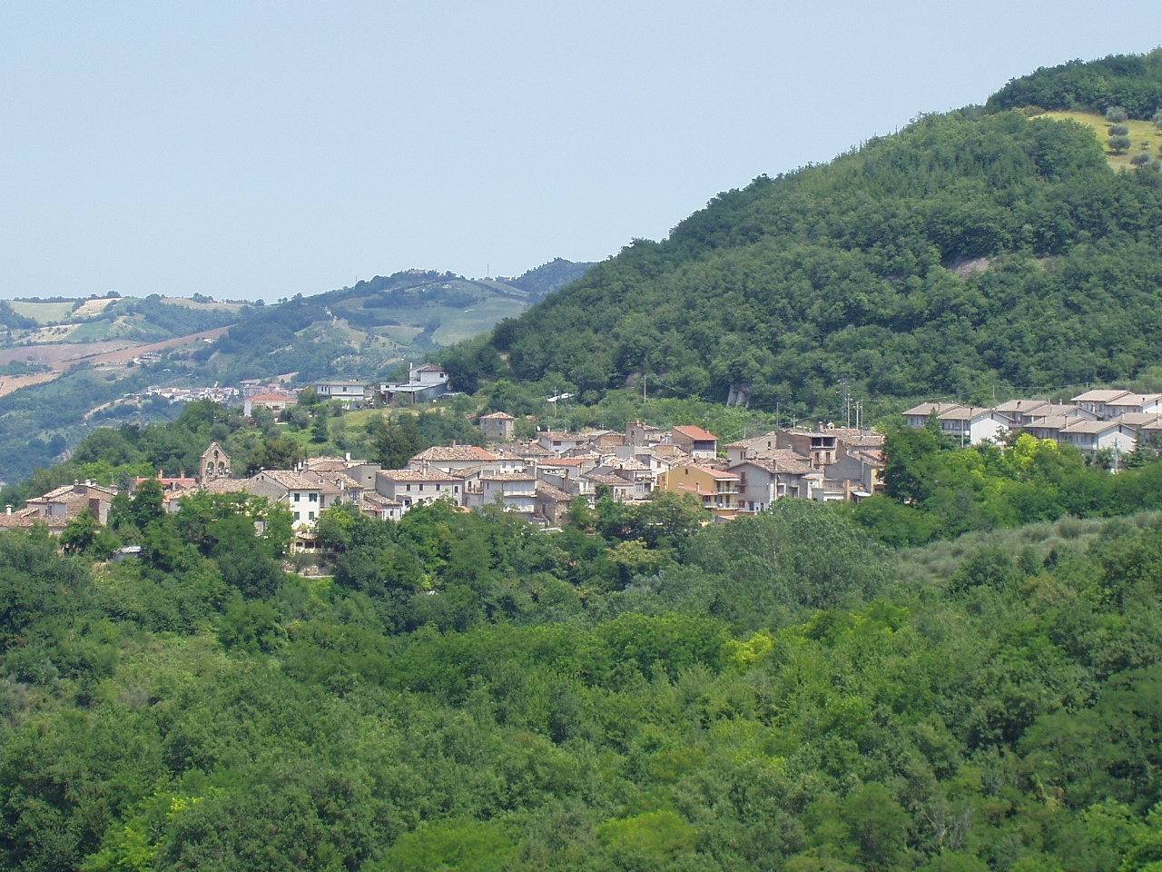 Valle San Giovanni (Teramo). Foto di Lucio De Marcellis